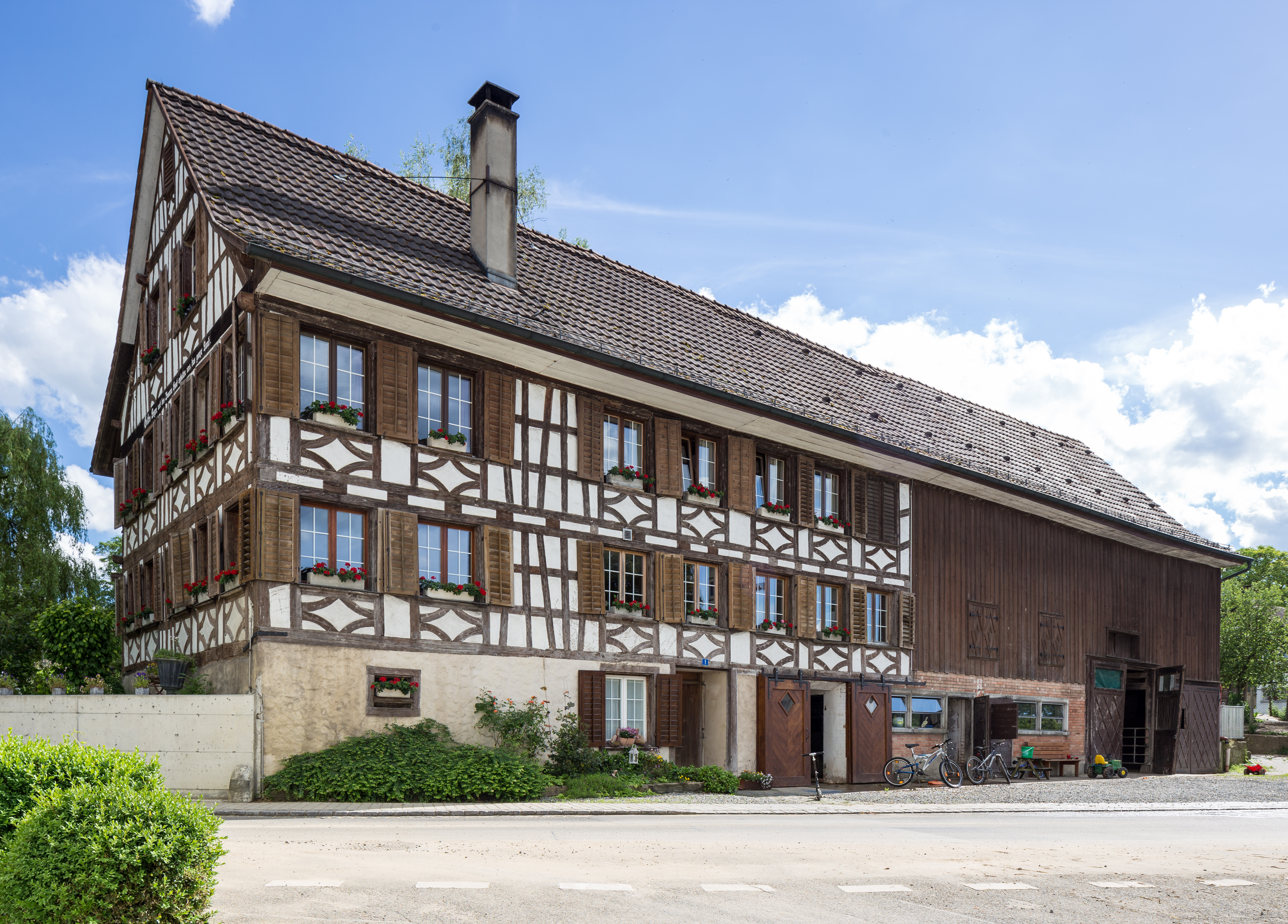 Bauernhaus Langstrasse 1 in Hugelshofen. Gesamterscheinung 18./19. Jahrhundert.